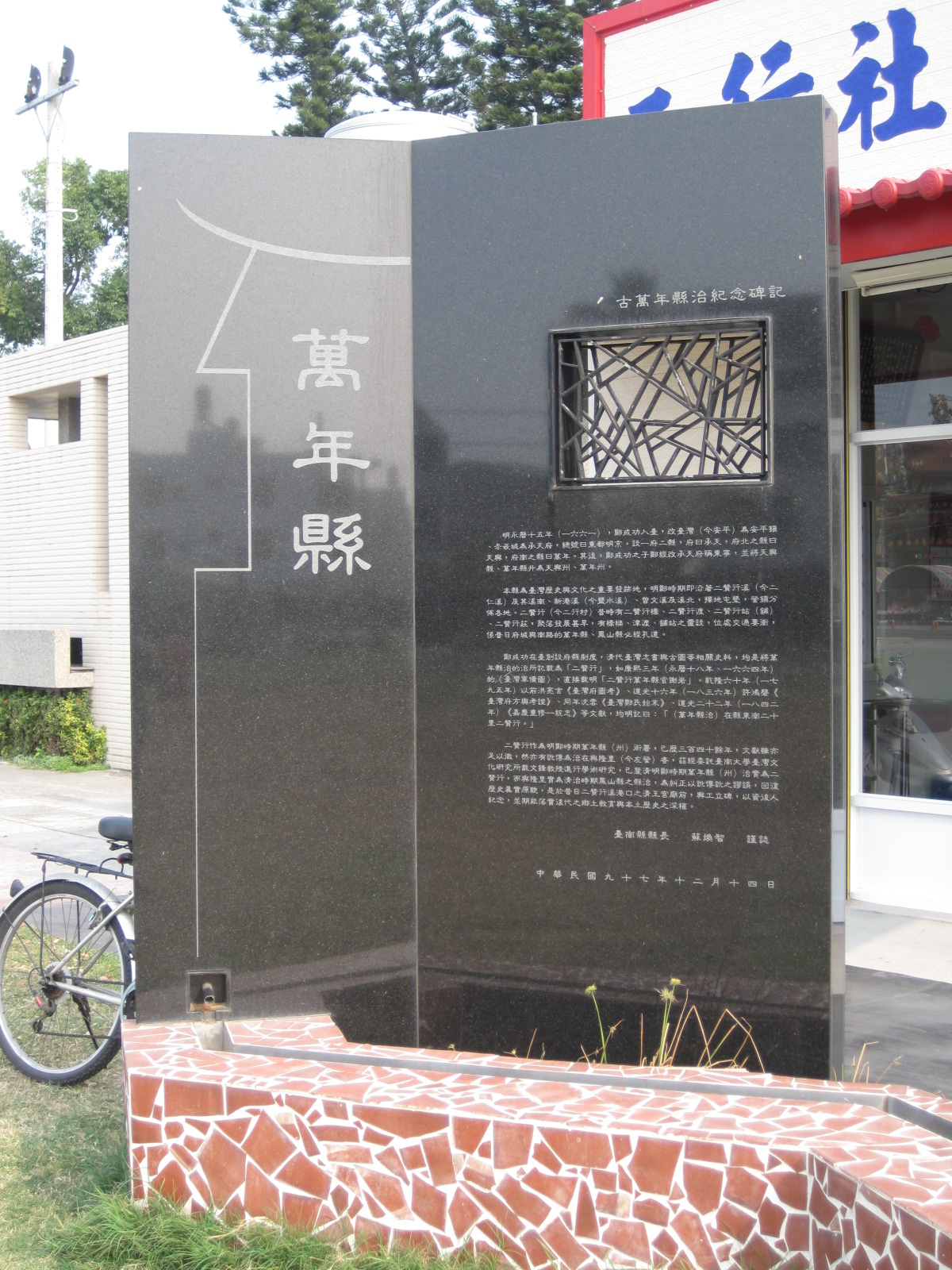 位在臺南仁德清王宮前的萬年縣紀念碑。